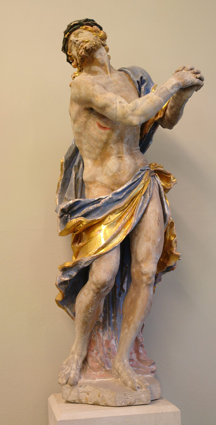 "Schmerzensmann" nach 1634 von Sebastian Walther für die Dresdner Frauenkirche erschaffen jetzt im Stadtmuseum